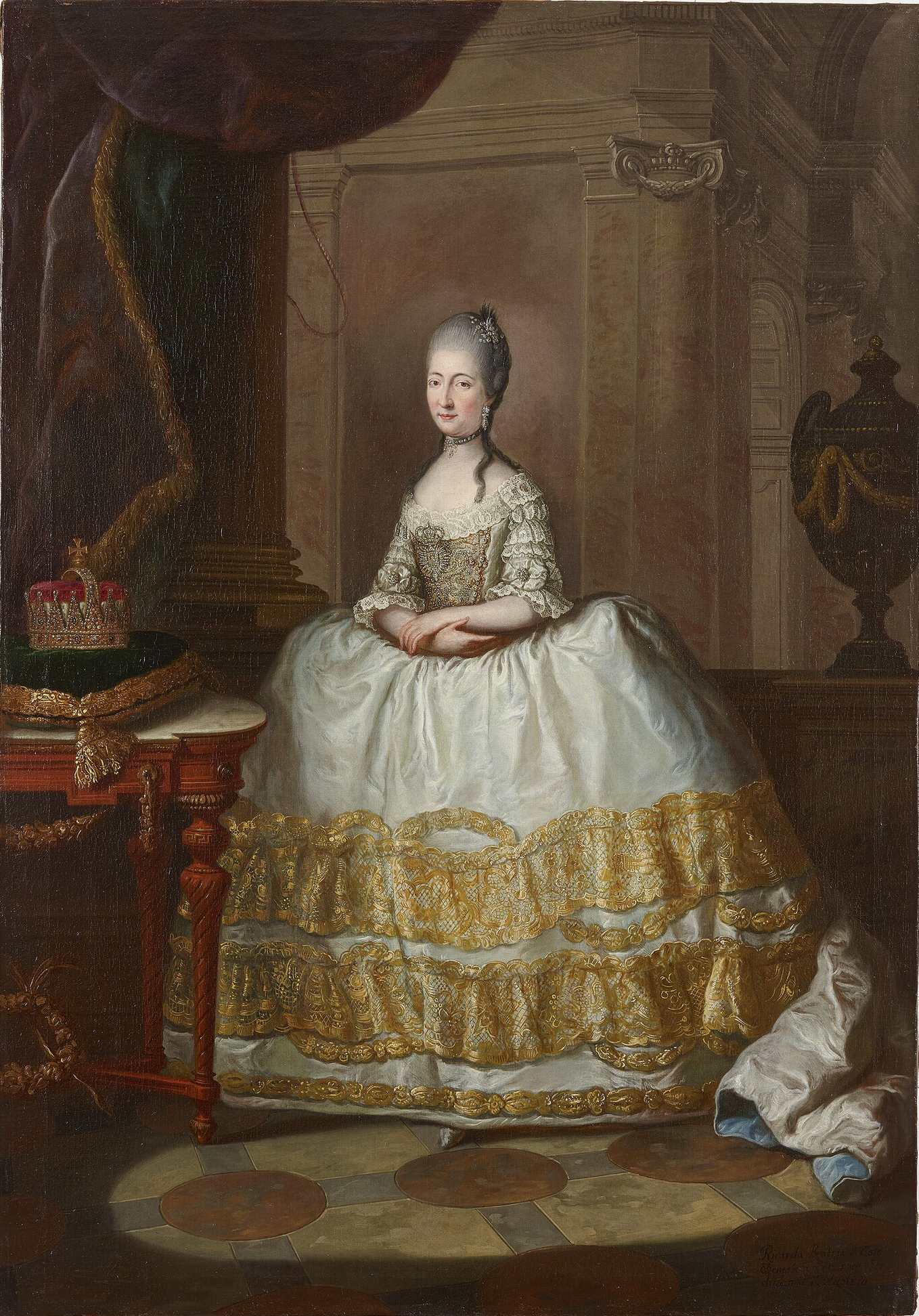 Portrait en pied de Marie-Béatrix d'Este, duchesse de Massa, épouse de l'archiduc Ferdinand d'Autriche (1760-1829).